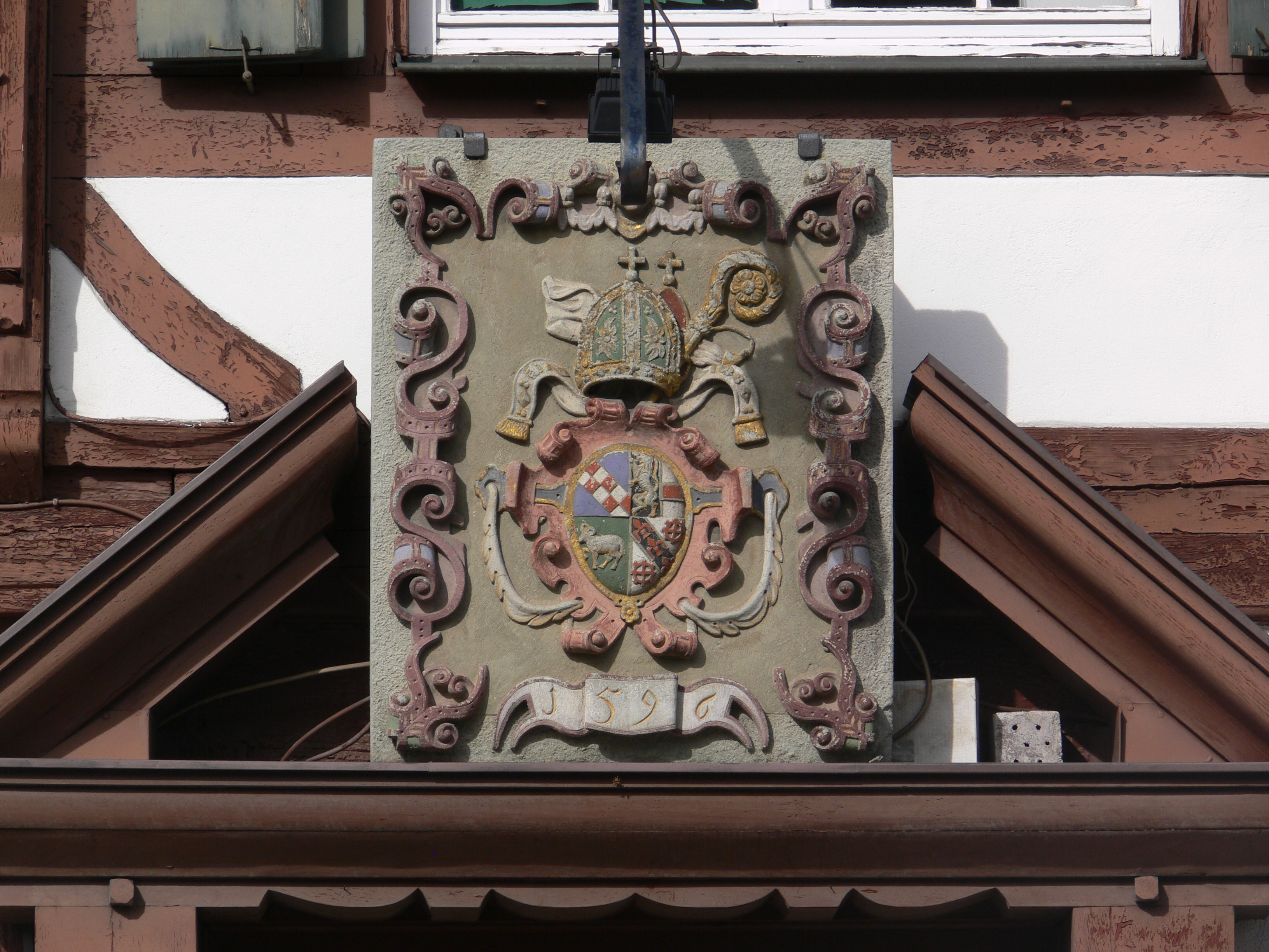 Bermatingen, Bodenseekreis: Gasthof Adler, Abtswappen des Salemer Abts Petrus II. Miller über dem Eingang, 1596